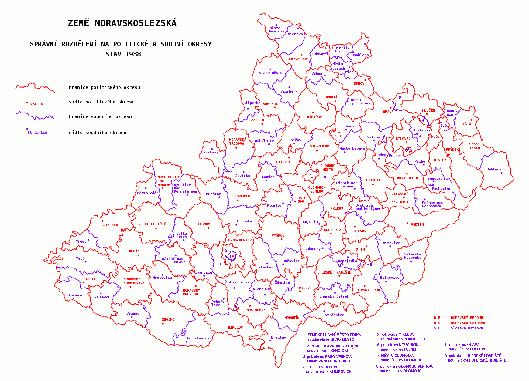 Soudní a politické okresy v Zemi moravskoslezské v roce 1938. Jména sídel se shodují s jejich tehdejšími úředními názvy.